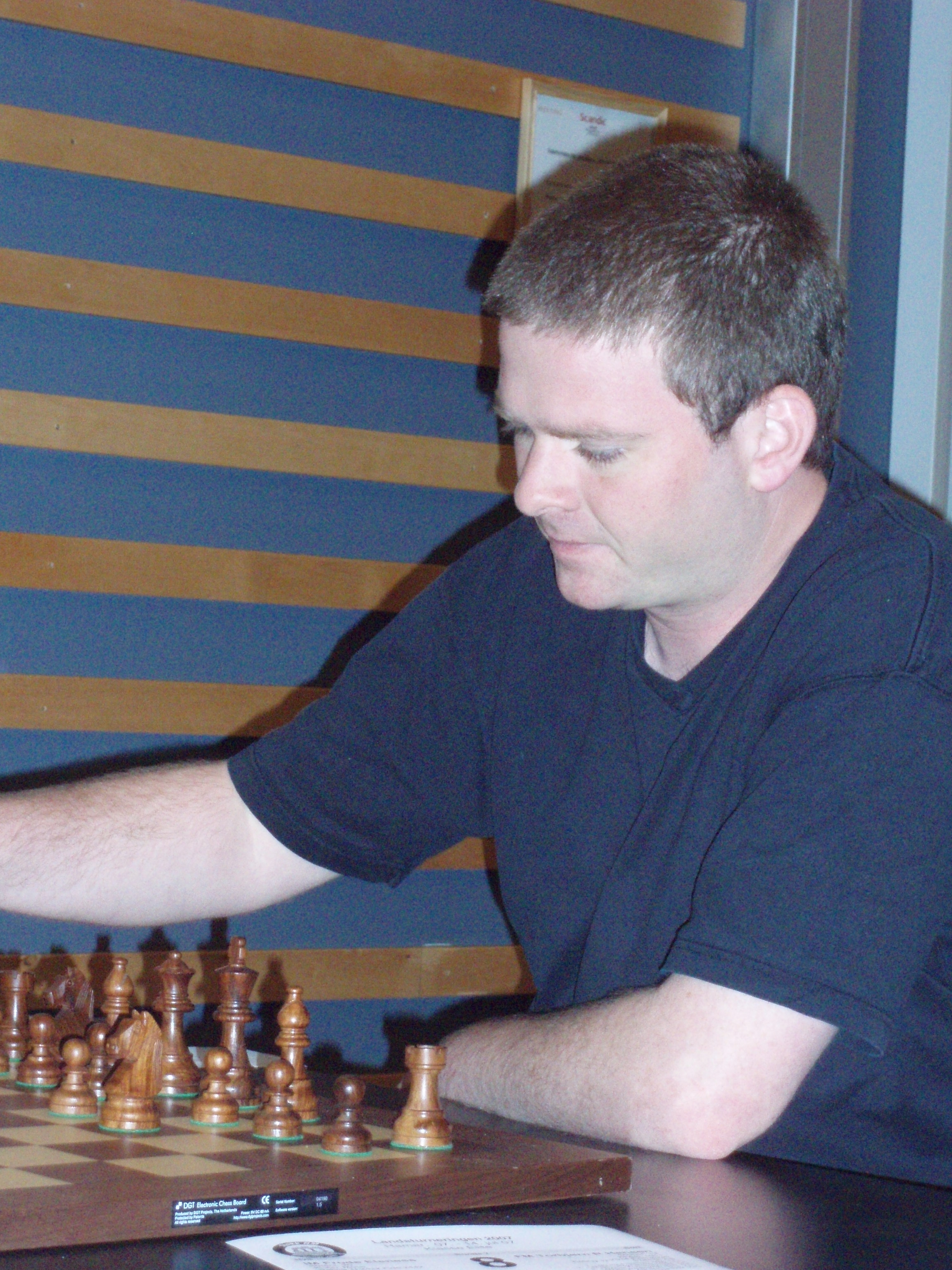 Torbjørn Ringdal Hansen at the Norwegian Chess Championship at Hamar 2007 Torbjørn Ringdal Hansen, NM på Hamar 2007